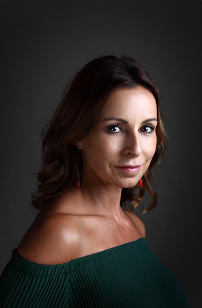 Bieke Ilegems